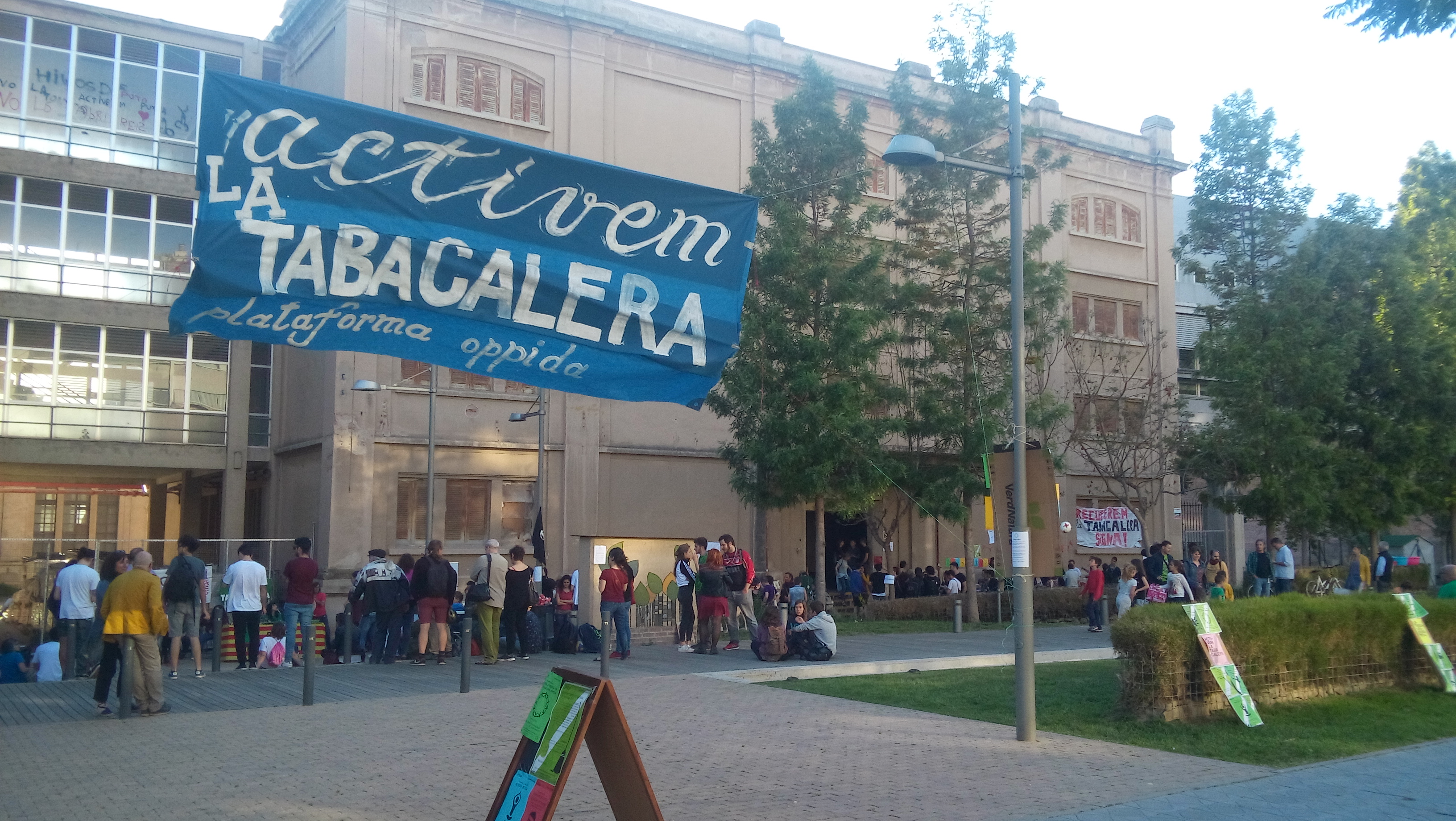 Ocupació simbòlica d'un edifici del complex per denunciar el seu abandonament.